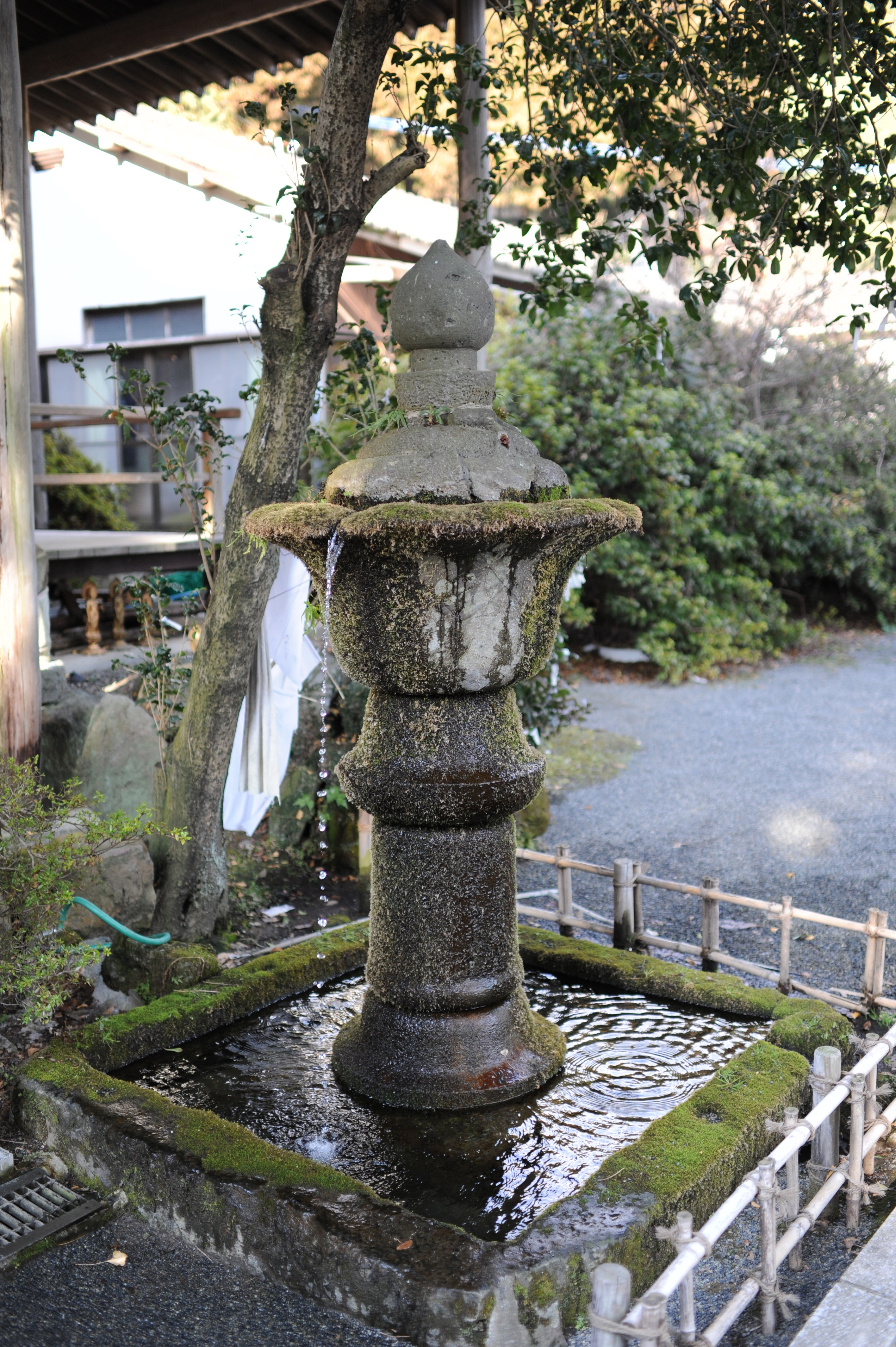 Fontaine à l'entrée du Reigando